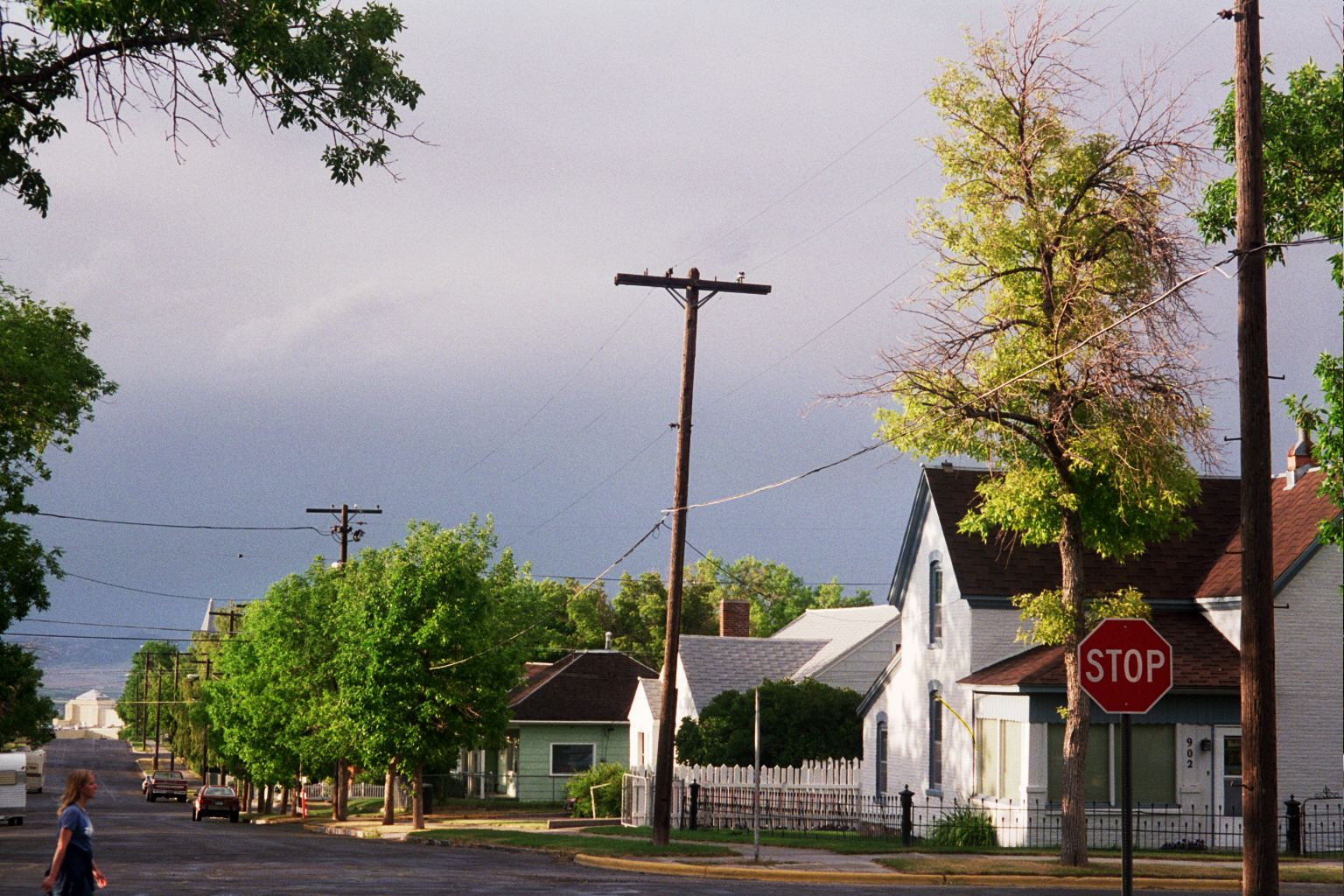 street in Helena, Montana, USA